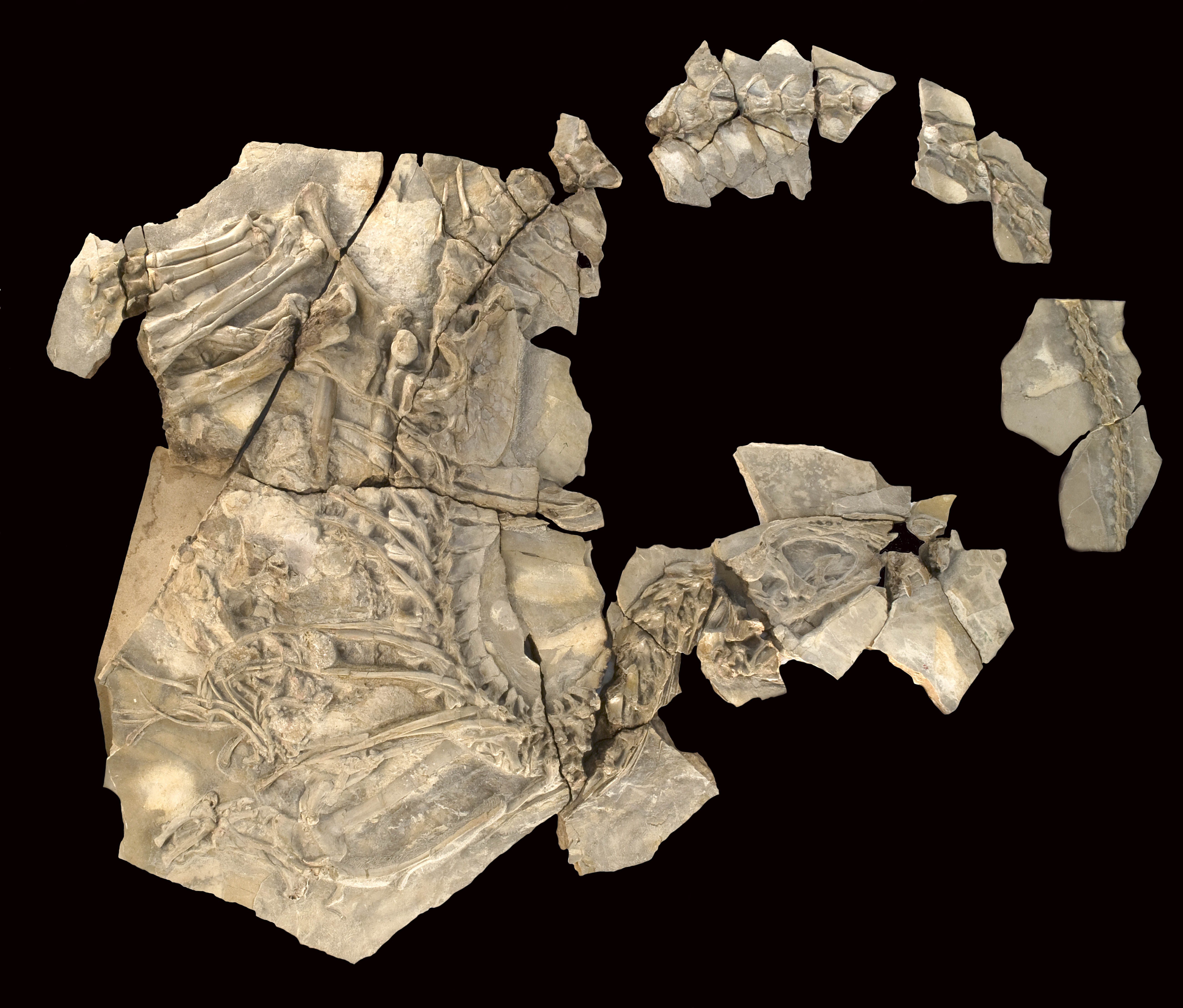 Aspecto del fósil del dinosaurio carnívoro Concavenator corcovatus ("el cazador jorobado de Cuenca") que vivió hace algo mas de 125 millones de años (durante el Cretácico Inferior) en Las Hoyas (Cuenca). El fosil represente el ejemplar más completo conocido de un terópodo carcarodontosaurio. Fotografía: Santiago Torralba